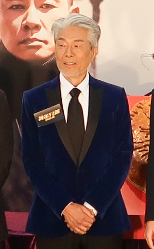 Yasuaki Kurata